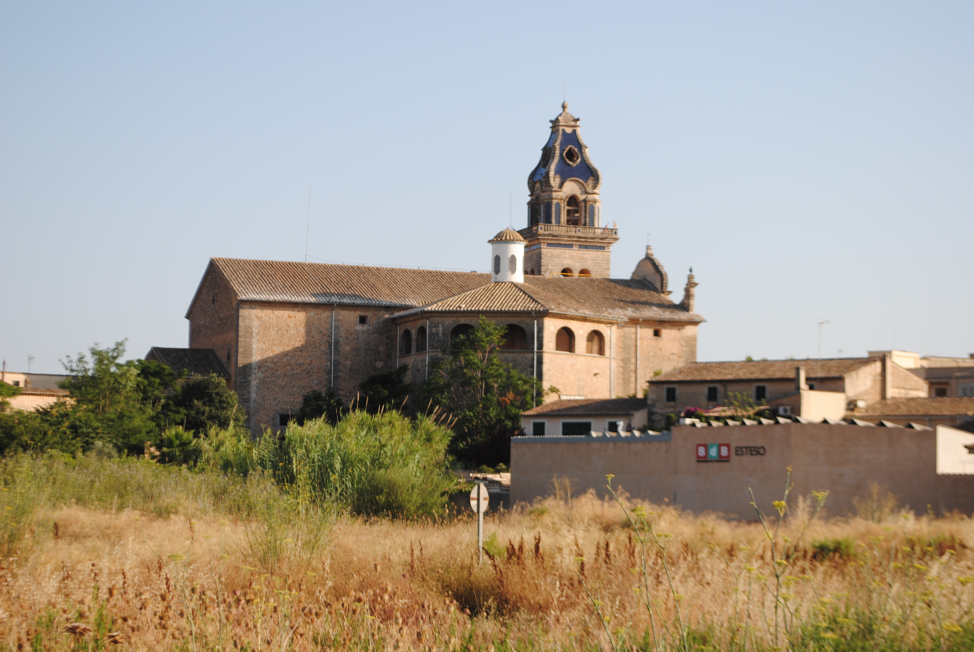 Església Parroquial de Santa Maria del Camí des de ses Quarterades